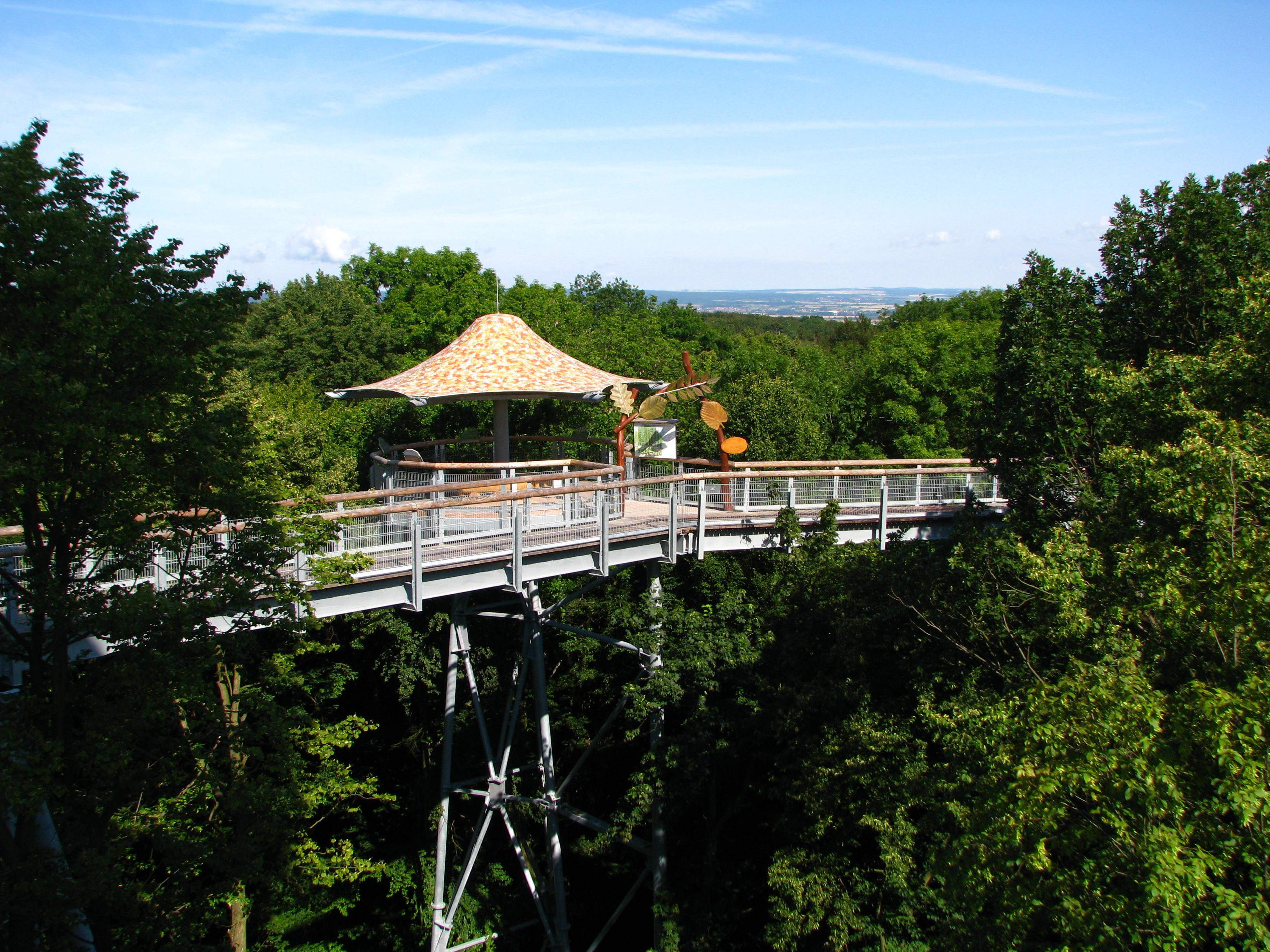 Baumkronenpfad im Nationalpark Hainich mit Infopilz.